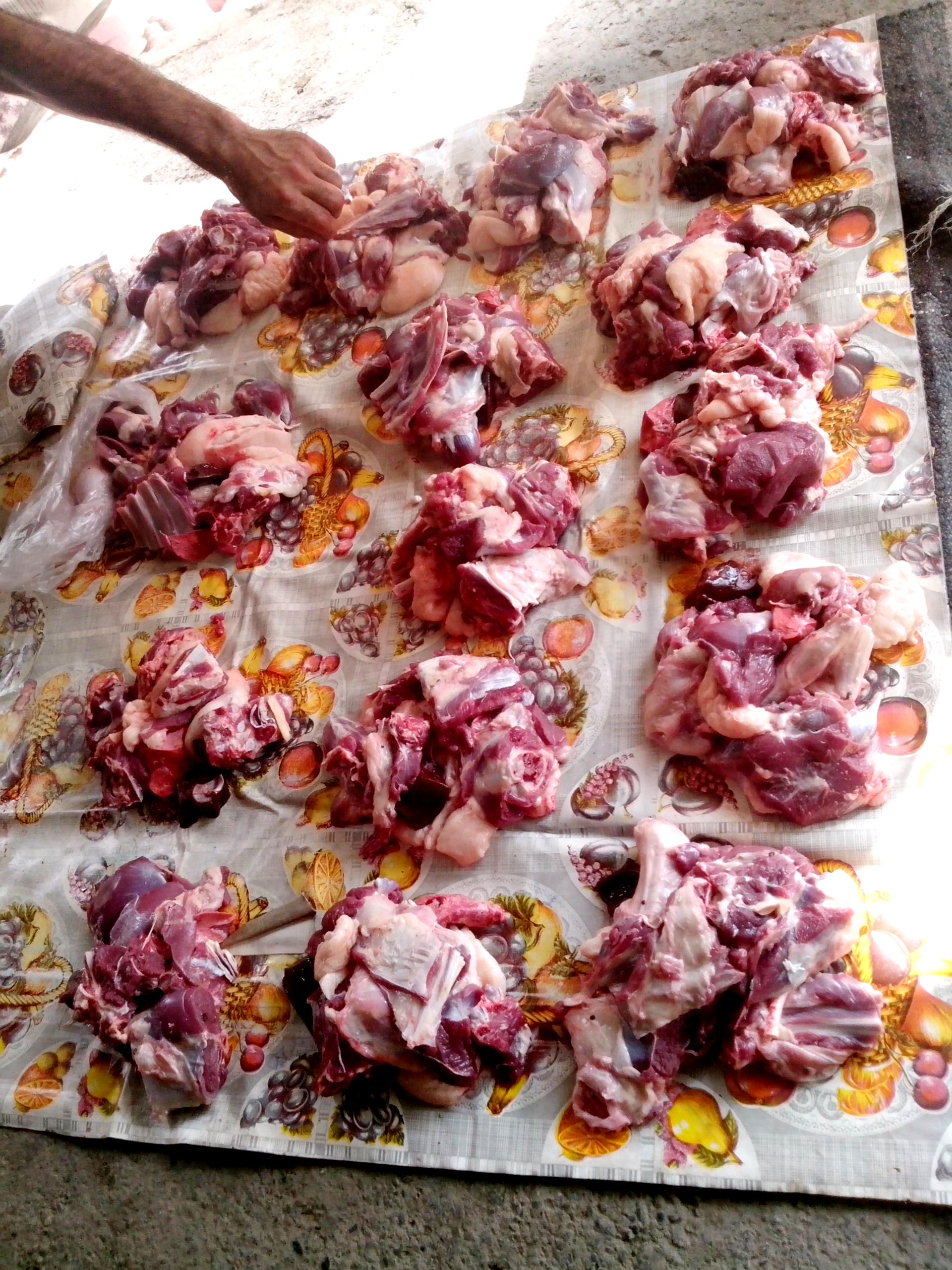 Ceklilərin qurbanlıq ətləri paylaması